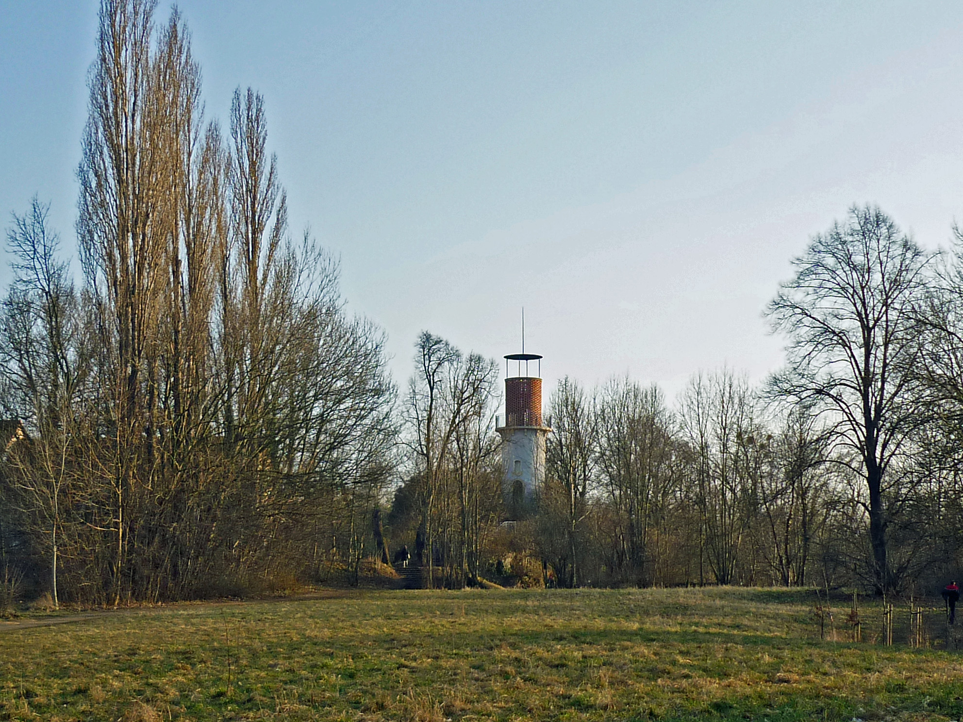 Alter Bienertpark an der Coschützer Str. in Dresden-Plauen (Hoher Stein)